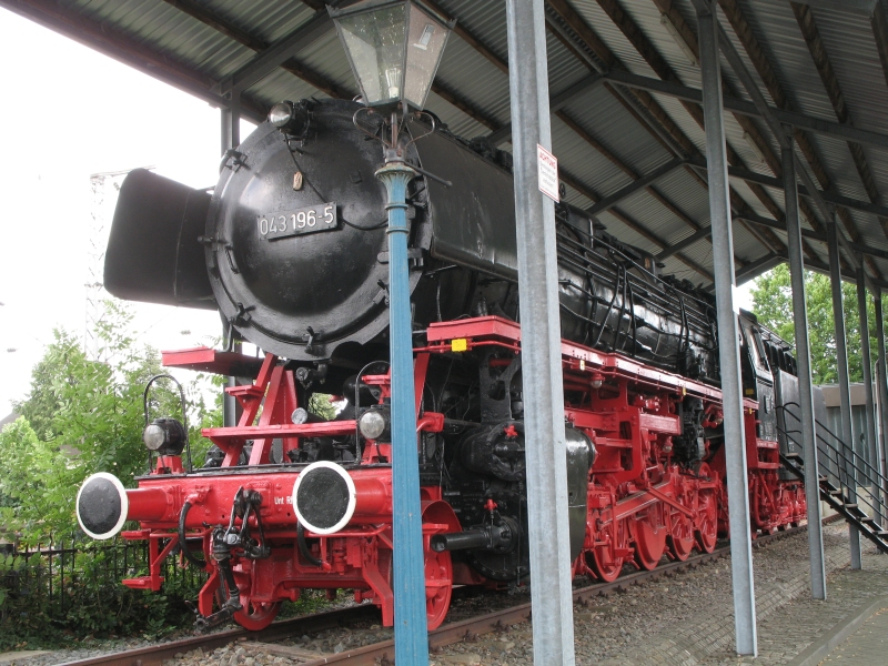 Dampflok BR 043, Salzbergen